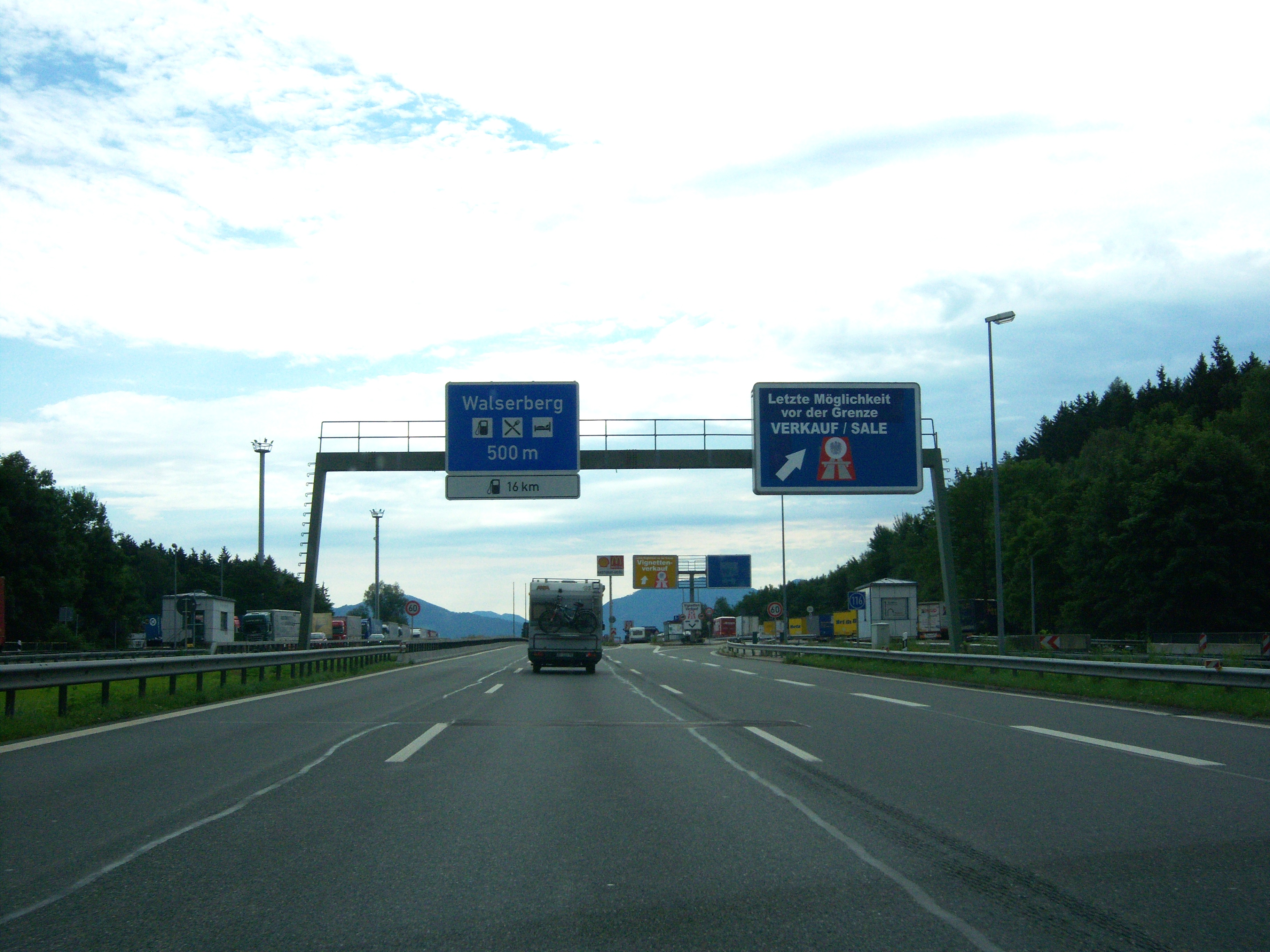 Bundesautobahn 8 Richtung Salzburg im Bereich des Grenzübergang Walserberg